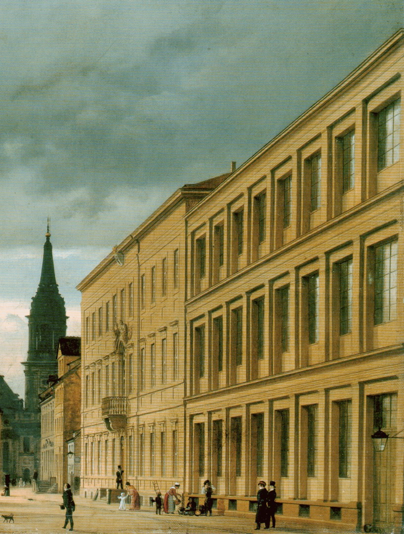 Gewerbeinstitut